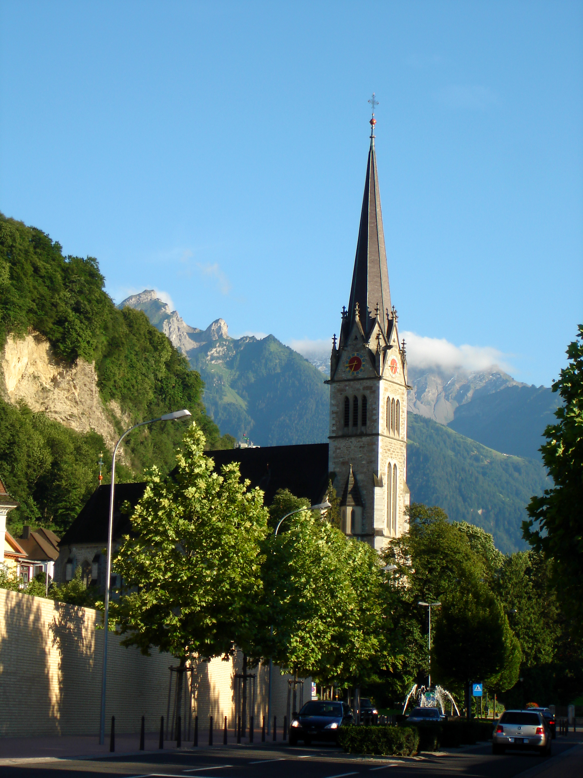 Liechtenstein: Kathedrale St. Florin in Vaduz